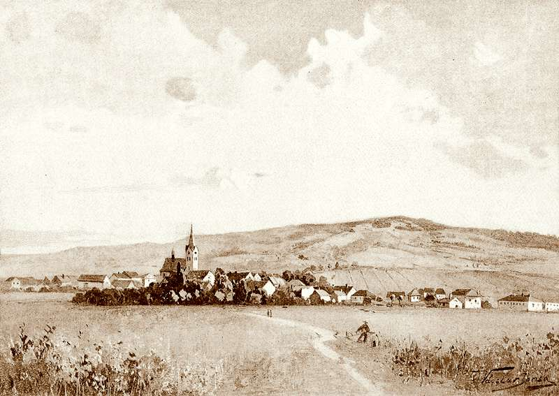 Sedlec od severozápadu (1891) Ottovy vlastivědné edice Čechy, díl VIII.: Táborsko, str. 64, Praha 1892 (dnes Sedlec-Prčice)